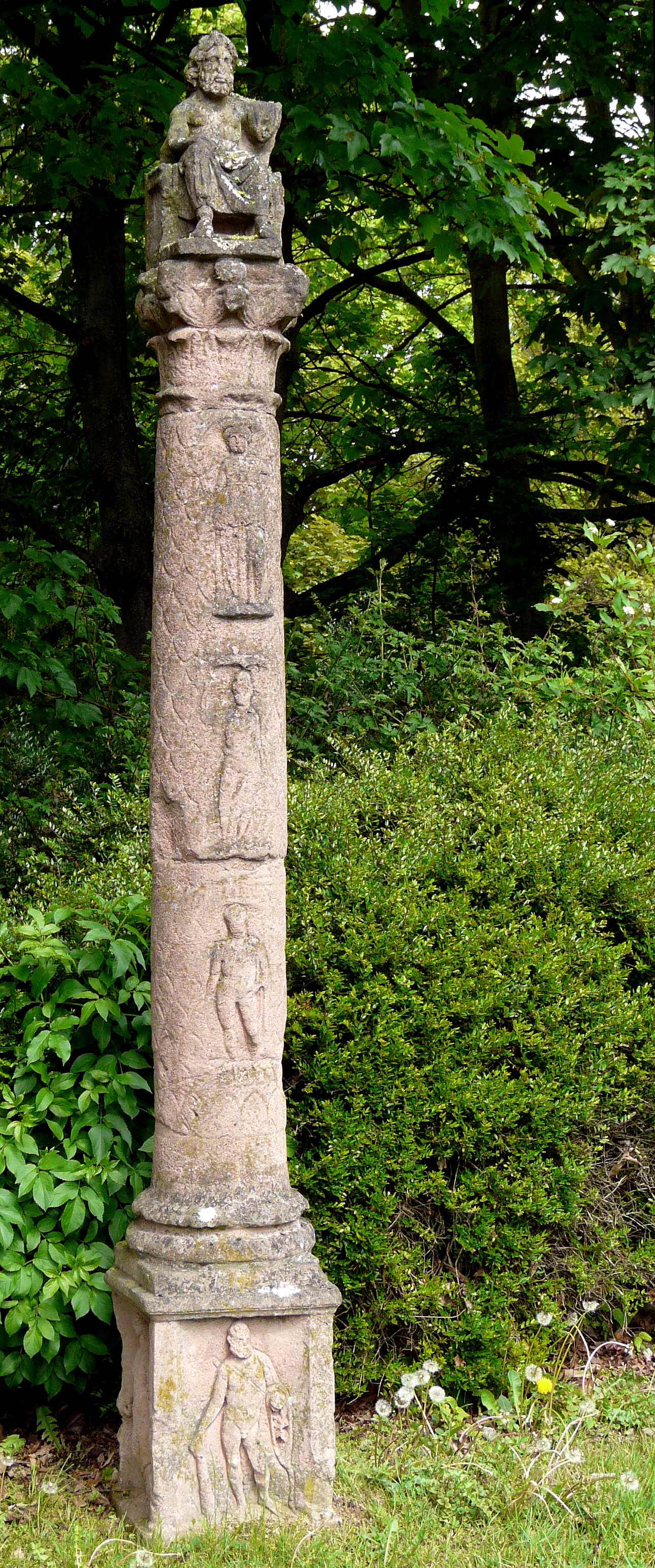 Jupitergigantensäule aus Novaesium; Historischer Rundgang, Neuss